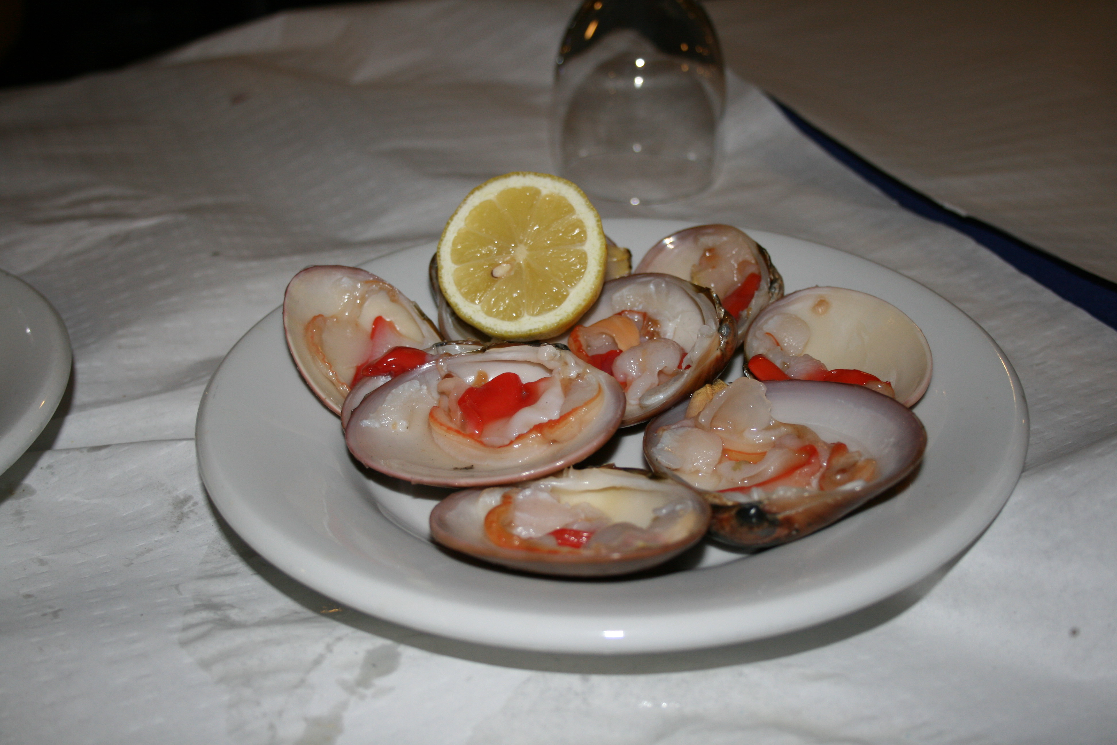 Moluscos, Conchas finas (Callista chione) - Servidos en "El Tintero" (Málaga) - malagueñas